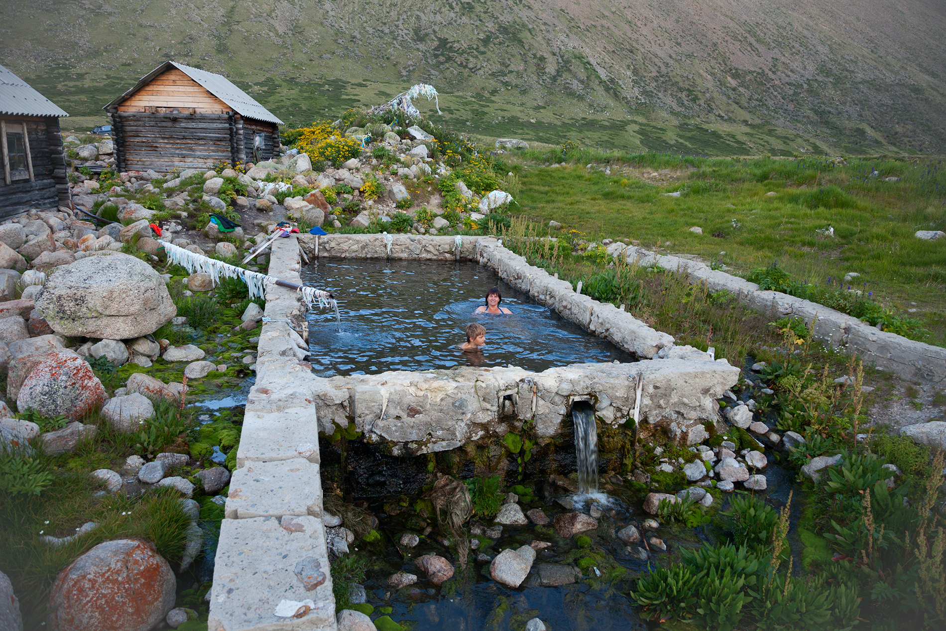 Джумалинский источник